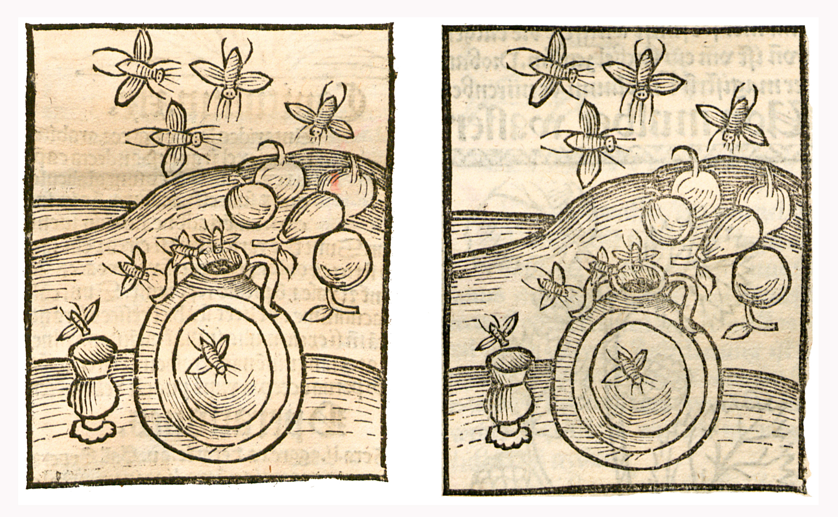 Abbildung von: Mucken